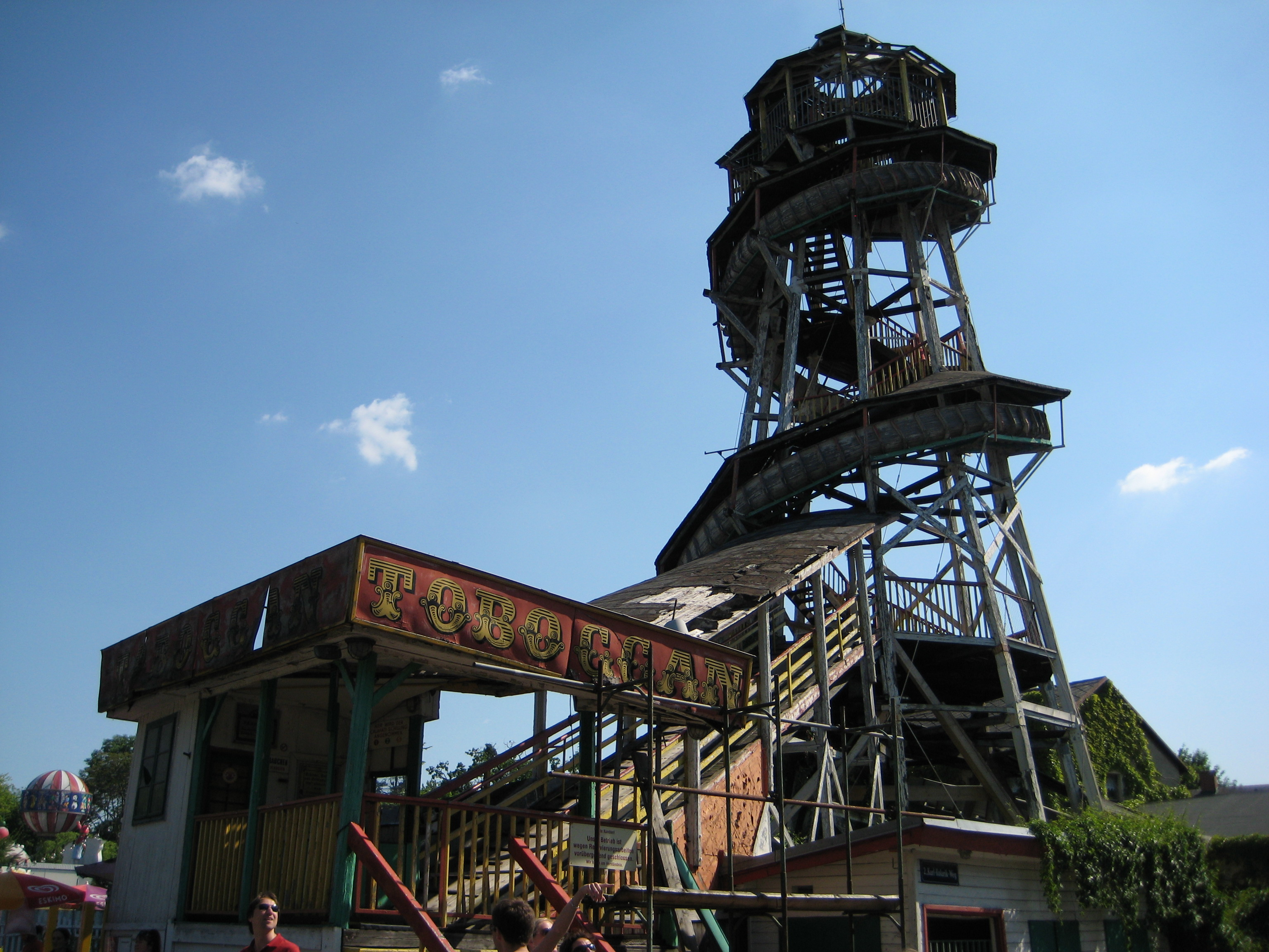 Toboggan vor der Renovierung (Rutschbahn)